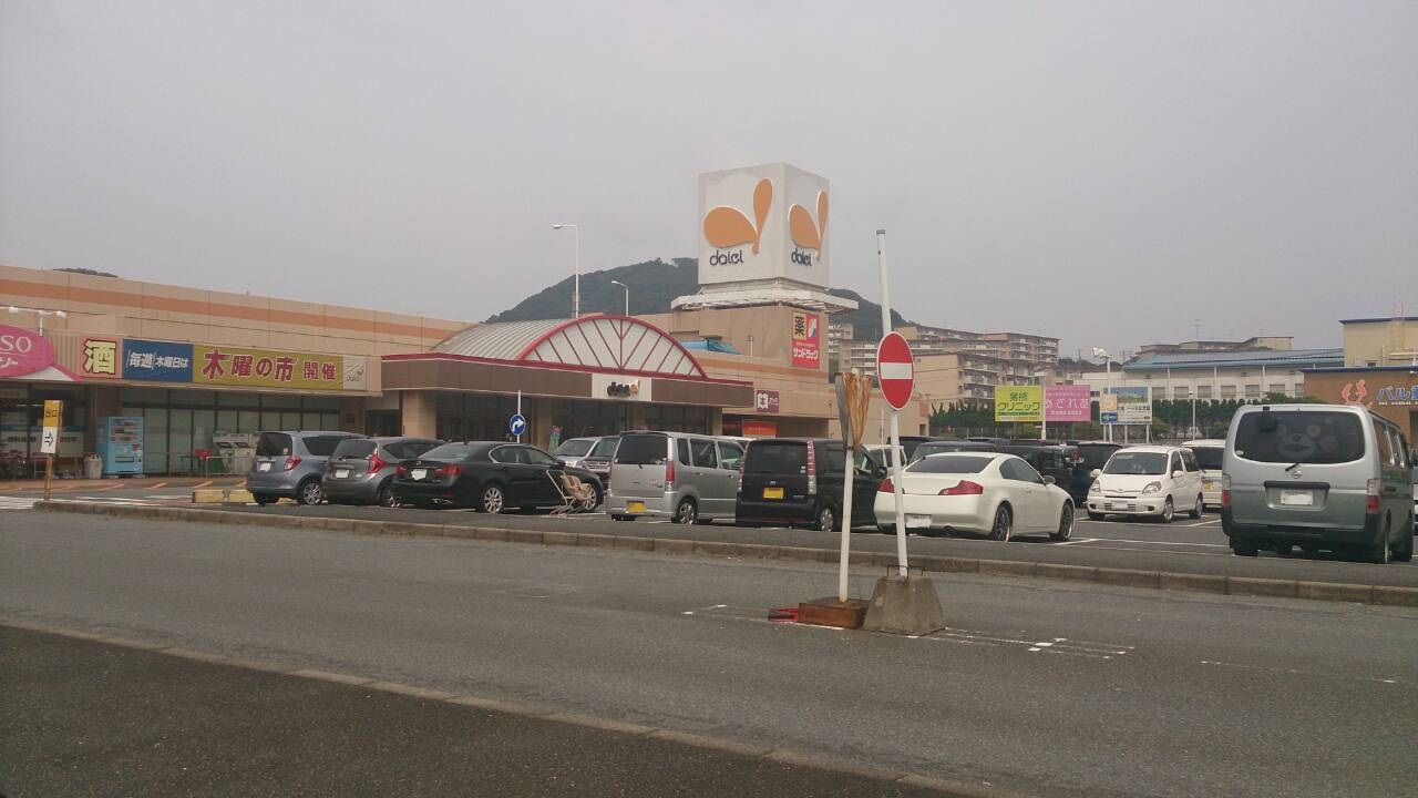 ダイエー水巻店外観